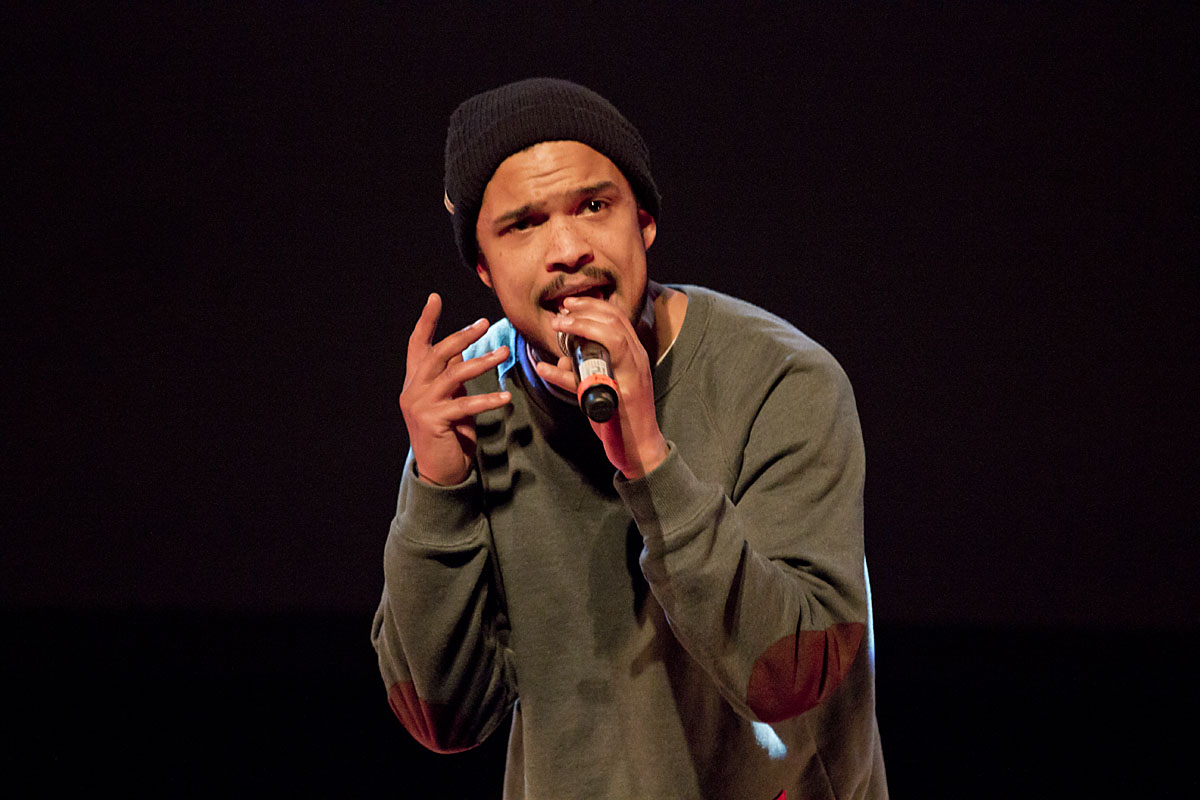 Shaka Loveless ved arrangementet Zetland Live #4 på Teater Bremen den 21. februar 2013